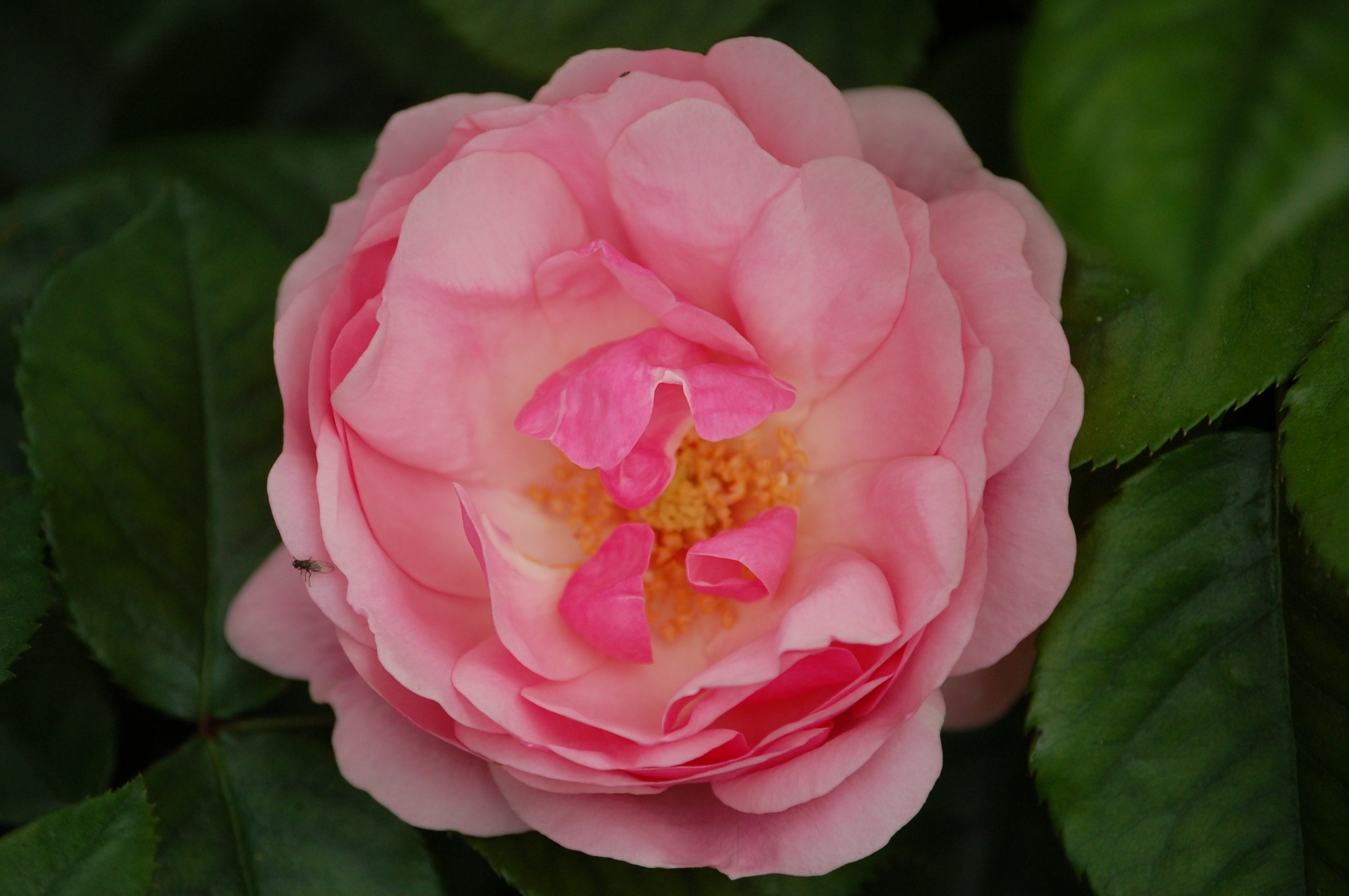 Rosa 'Bernd-Weigel-Rose'